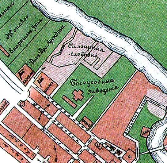 Фрагмент плана города Симферополя второй половины XIX века. Богоугодные заведения.